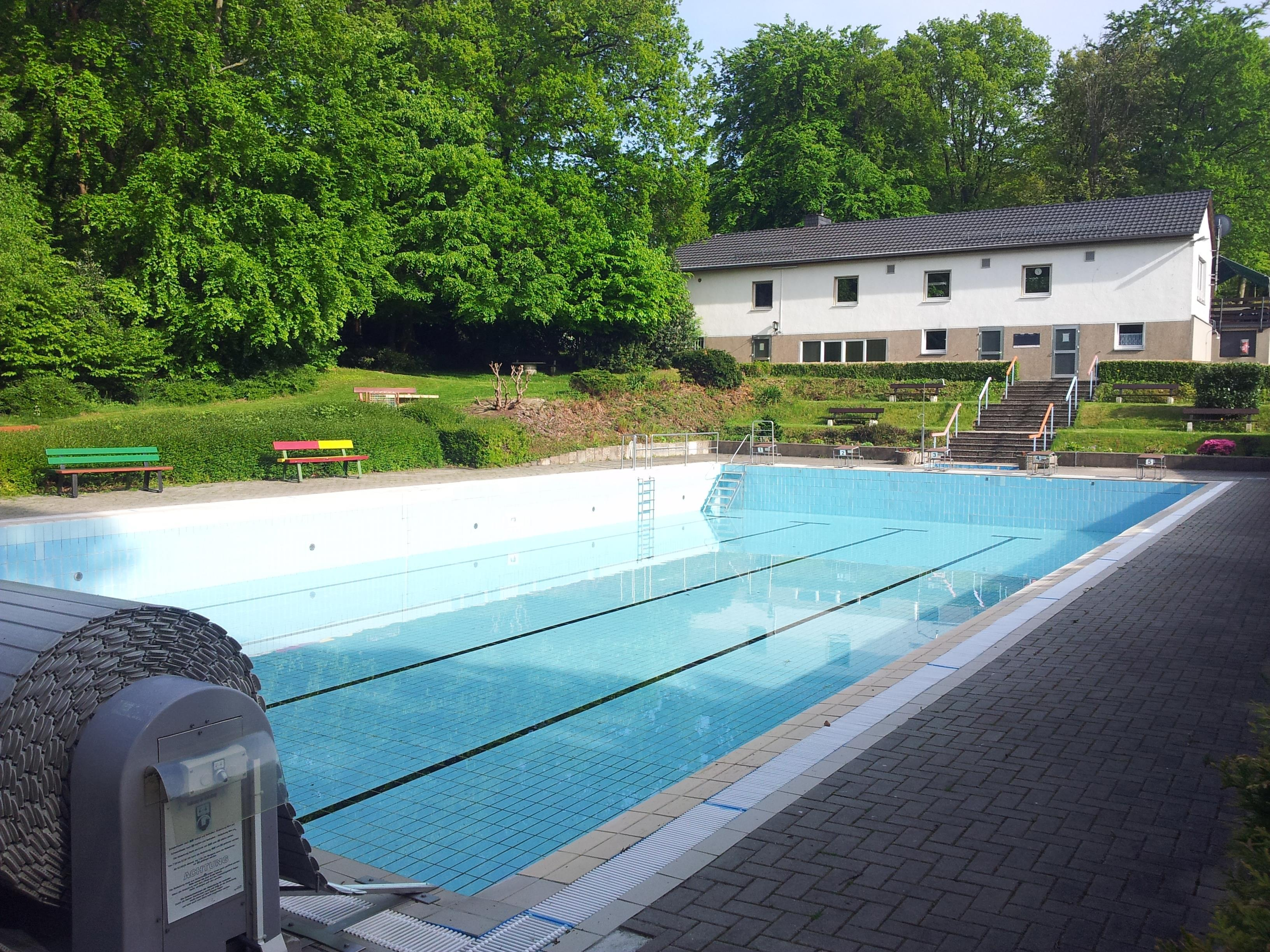 Schwimmbad des FKK-Vereins Sport- und Naturfreunde Witten (SuN) im Kermelberg in Witten